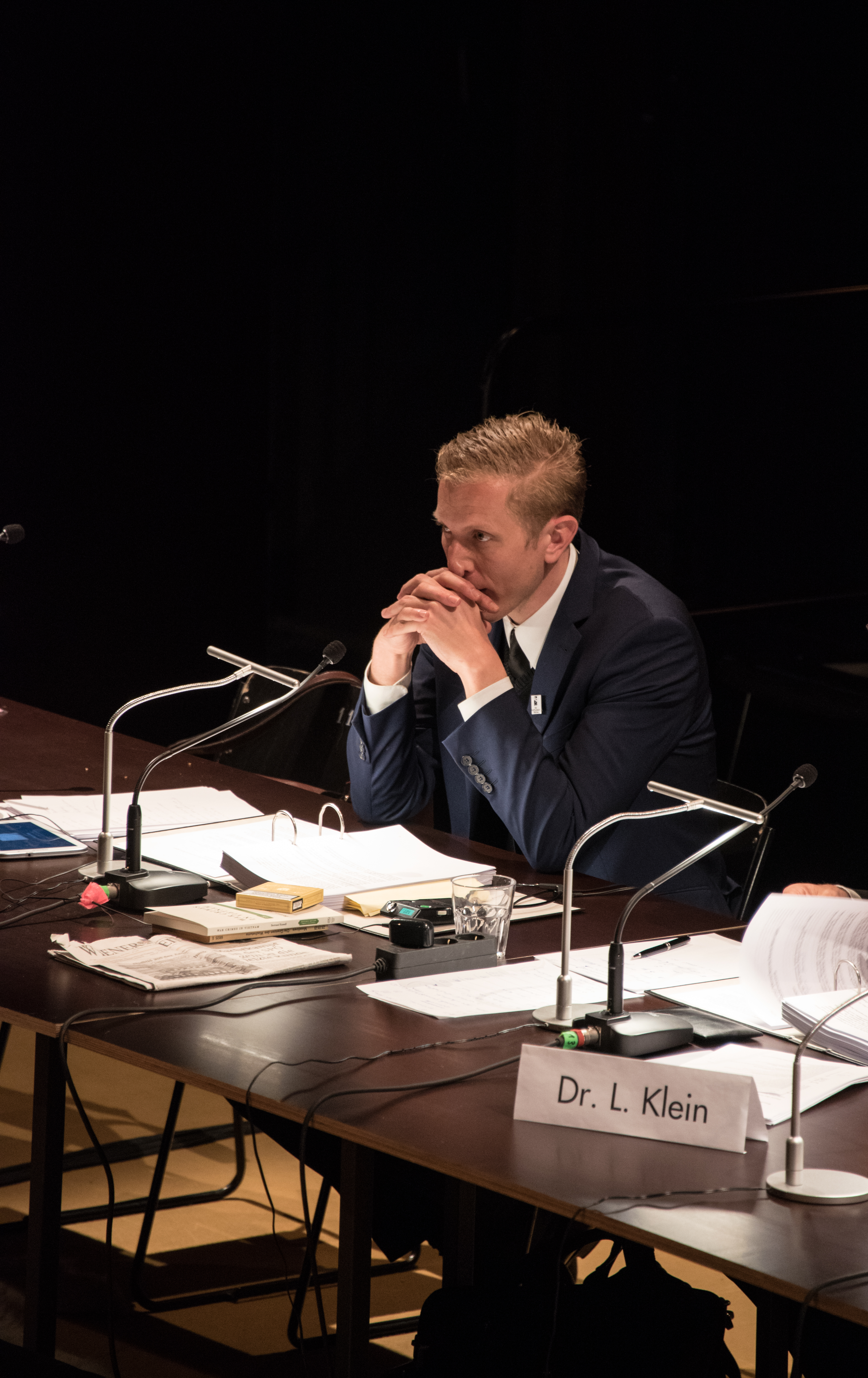 Das Kapitalismustribunal, Brut, 2016